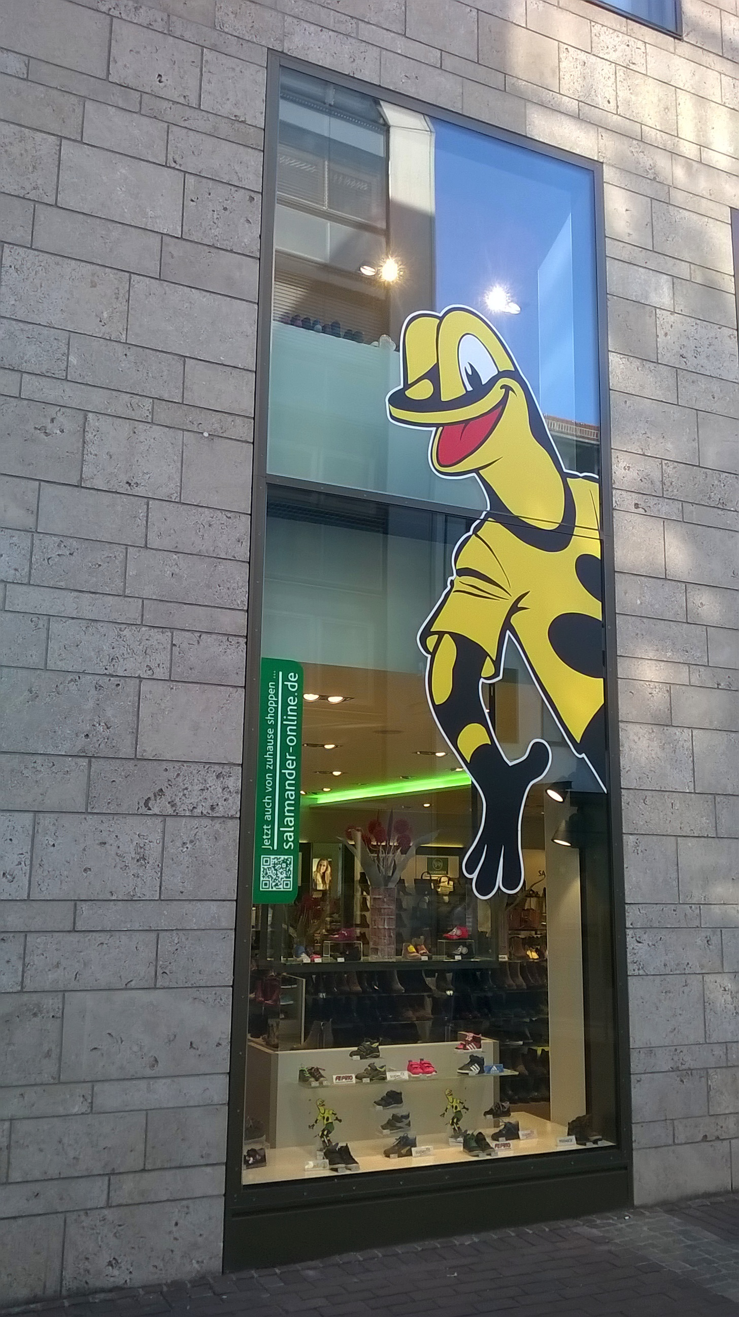 Salamander Schaufensterwerbung mit Lurchi. Salamander Filiale Hirschstraße Ecke Pfauengasse, Ulm